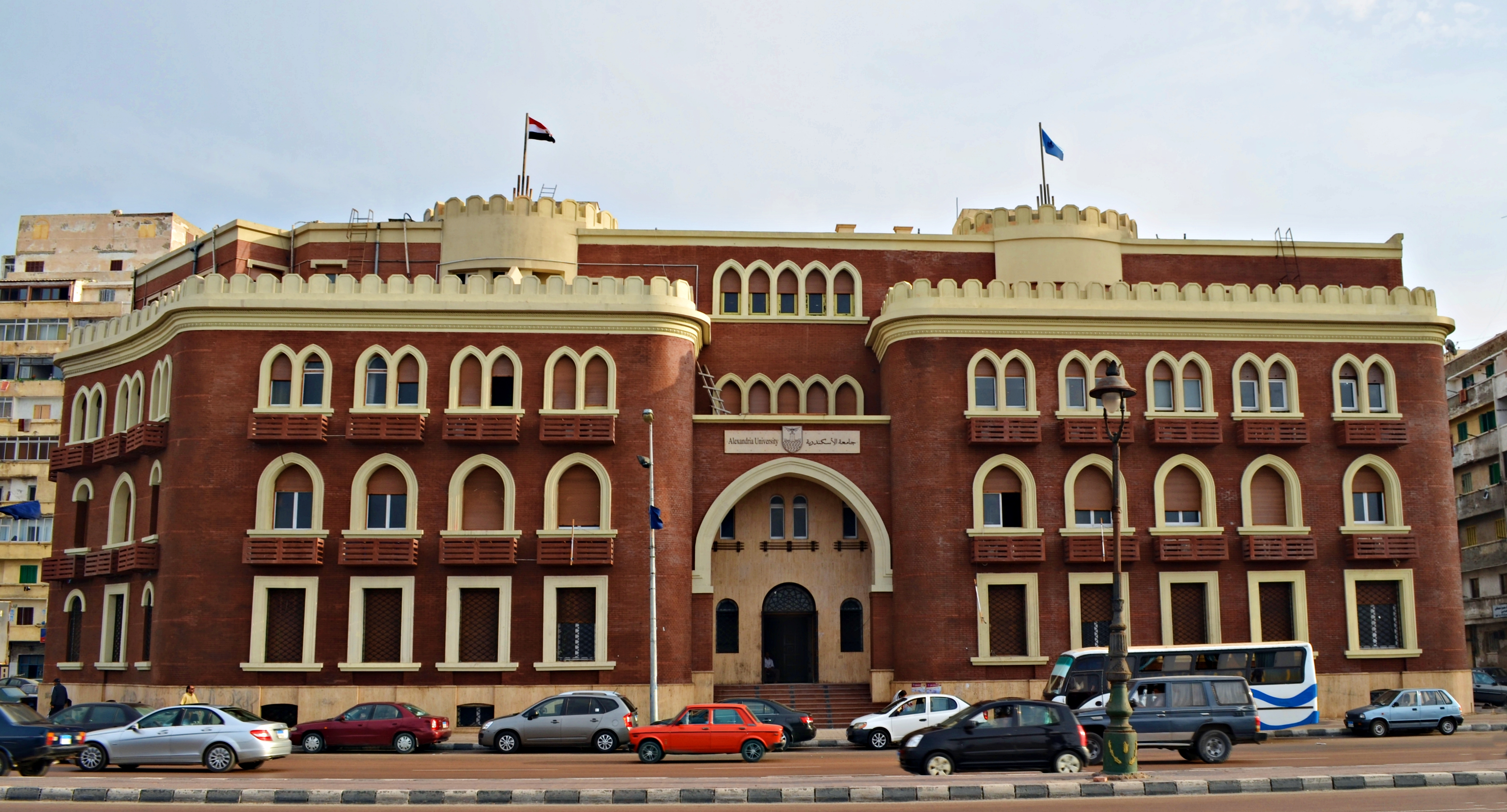 المبنى الرئيسي لجامعة الإسكندرية، مصر